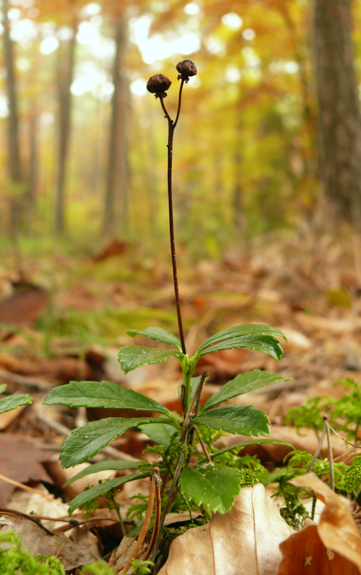 Chimaphila umbellata, Tauberland, Germany